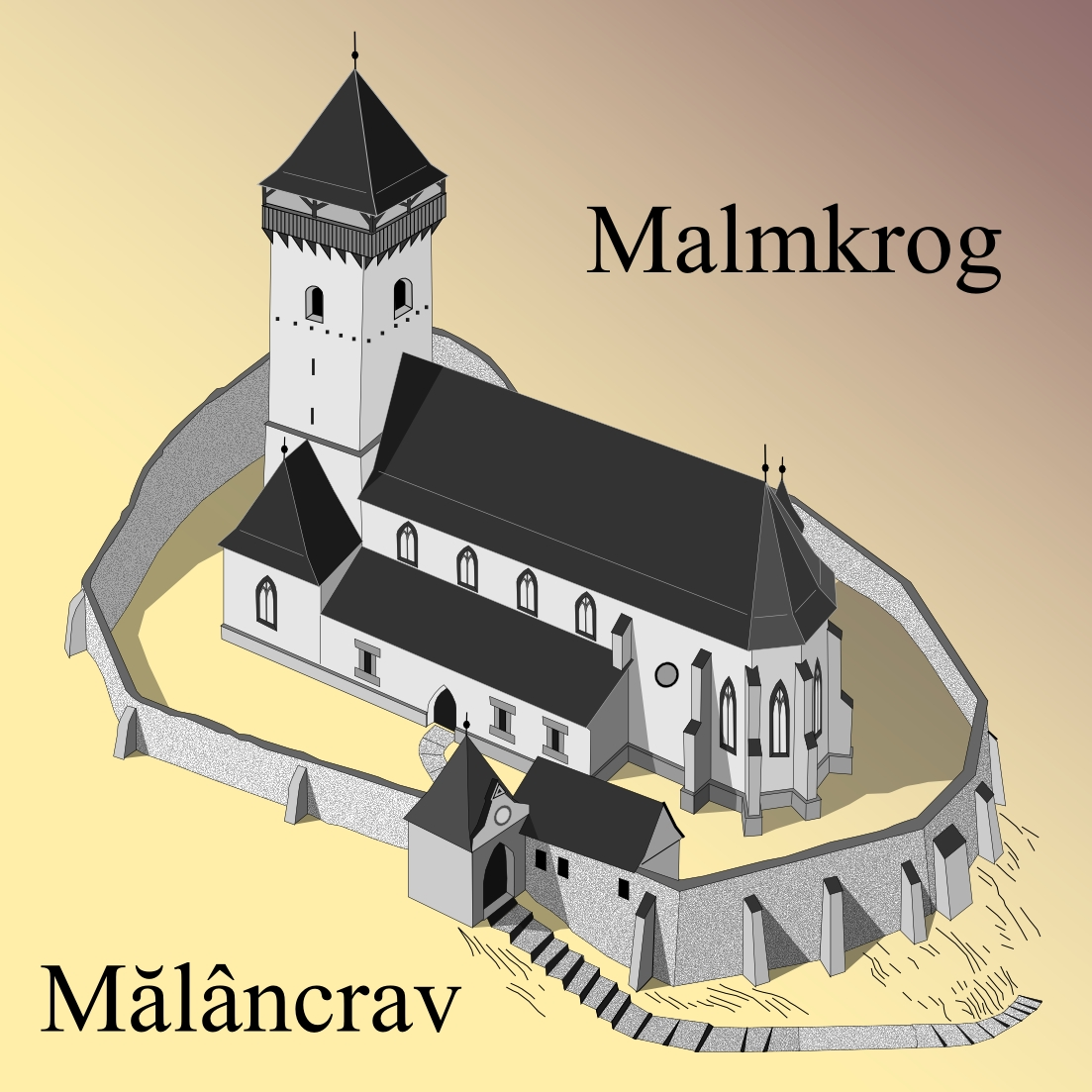 Biserica fortificata din Malancrav.